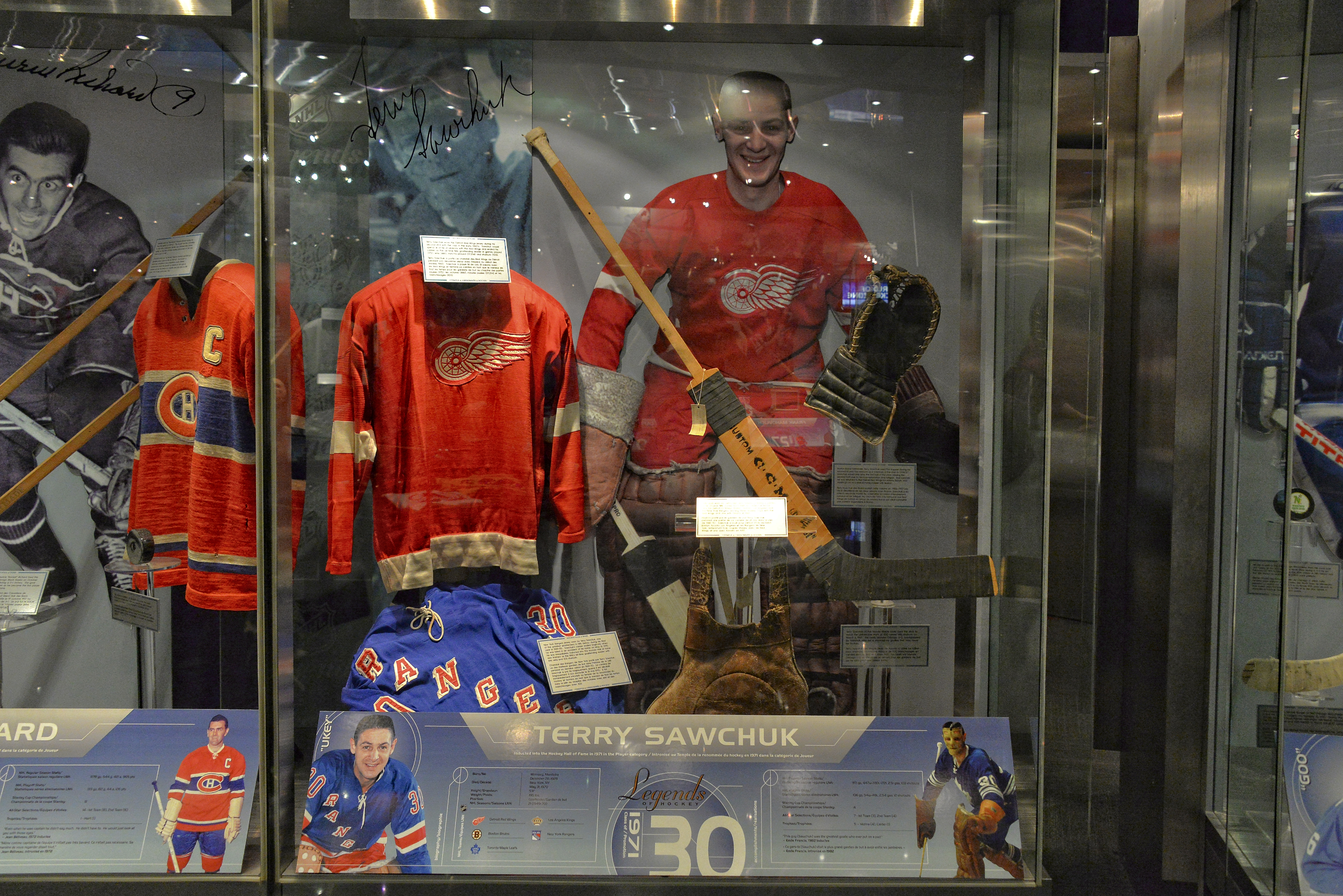 Вітрина, присвячена славному канадійському воротареві Террі Савчуку в Залі Слави Гокею, Торонто